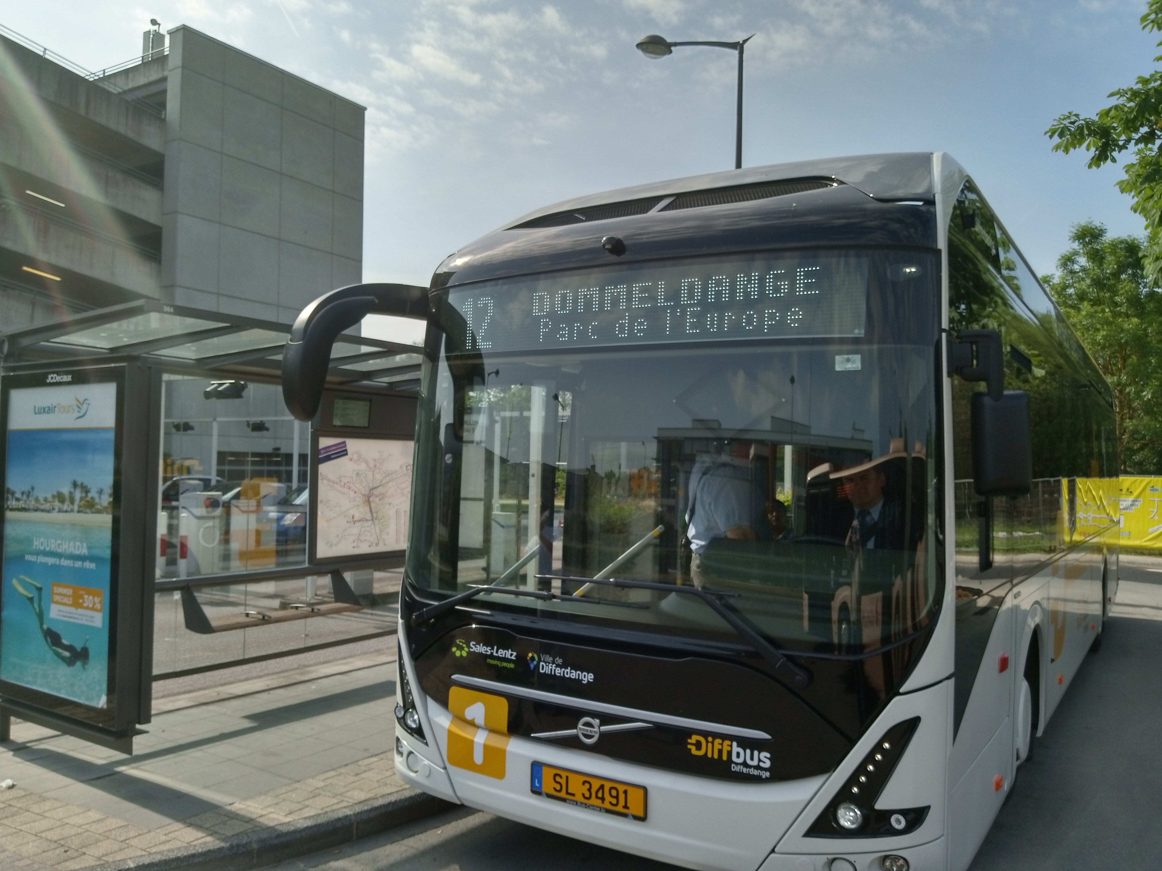 Un bus « Volvo 7900 Electric » à l'arrêt P+R Bouillon. Le véhicule - normalement en service sur le réseau « Diffbus » (Ville de Differdange) - est en essai sur la ligne AVL 12.